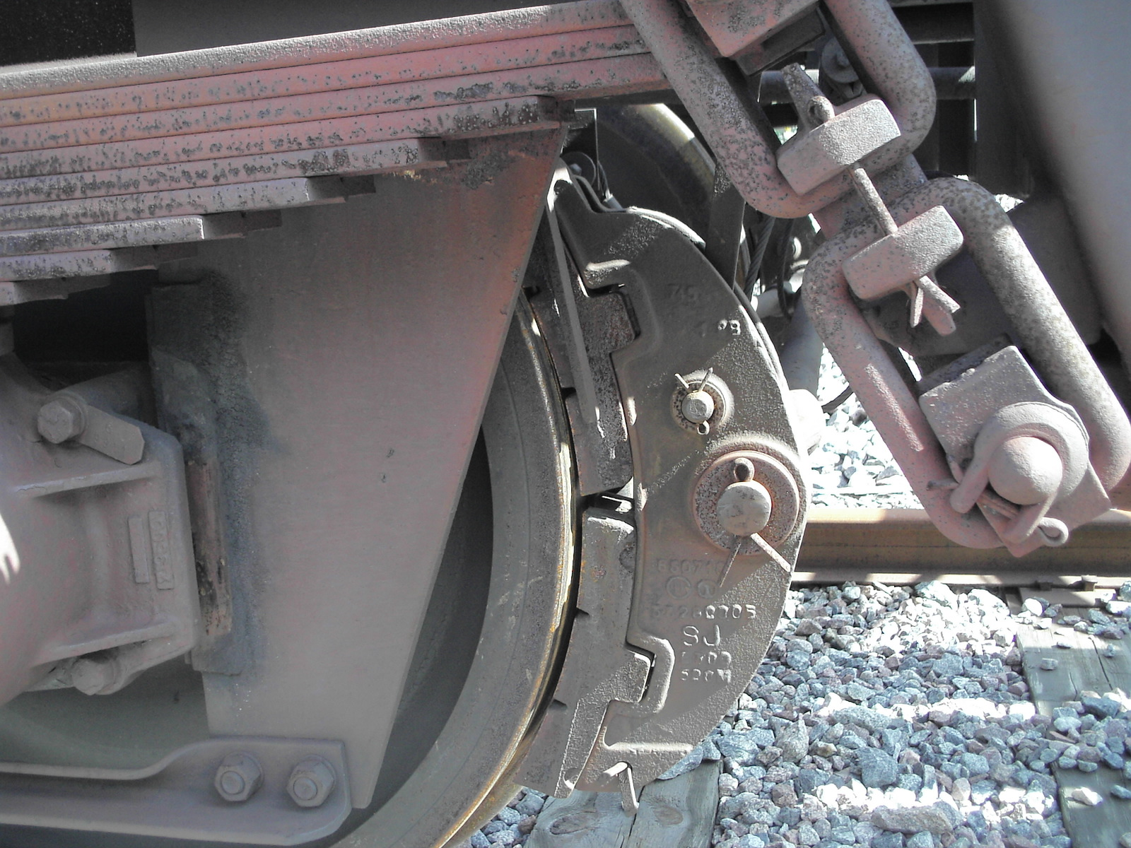 Bromsblock